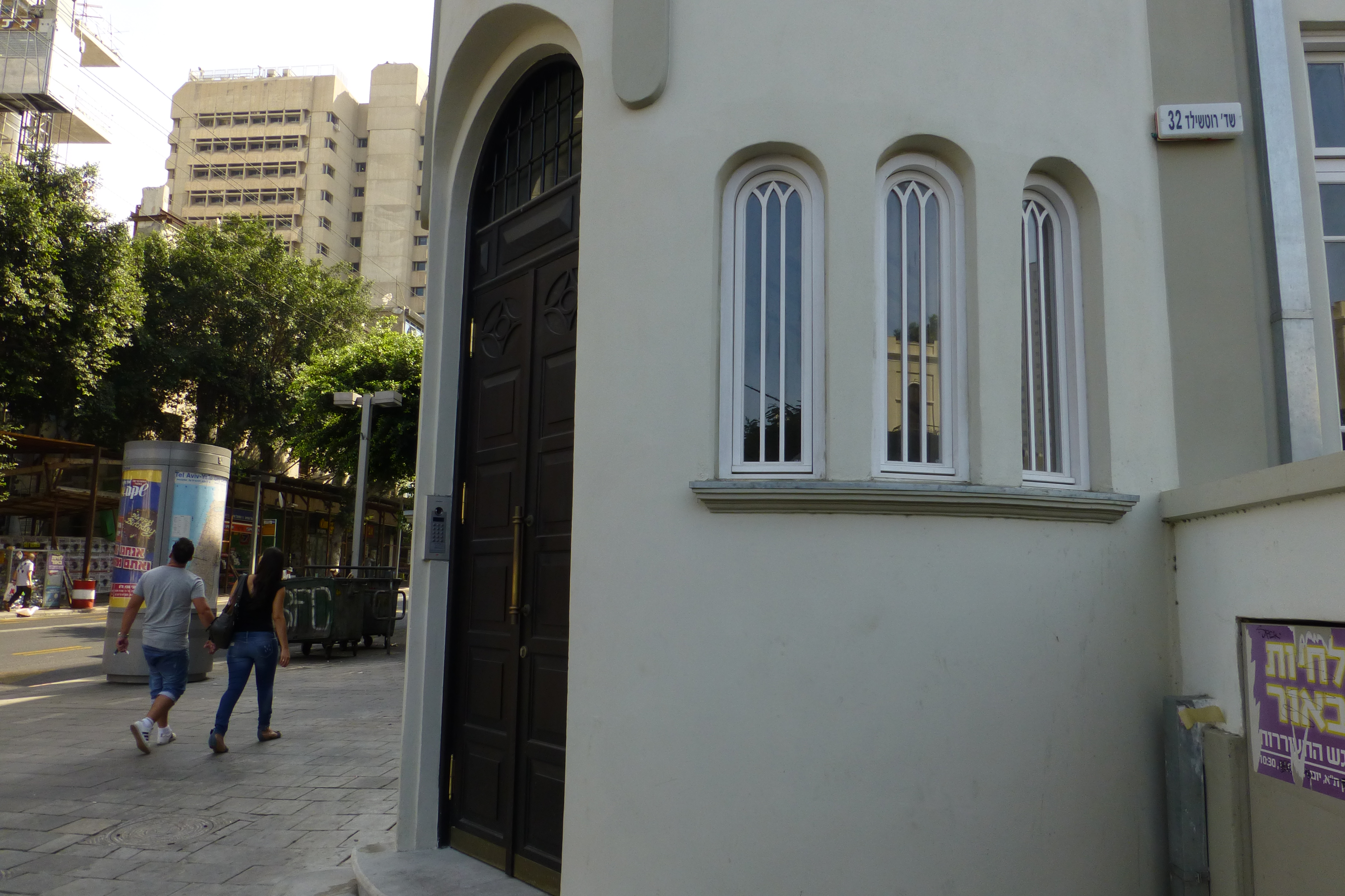 שדרות רוטשילד 32, תל אביב-יפו